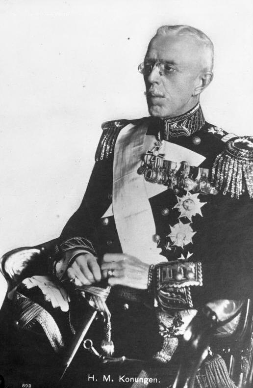 25 jähriges Regierungsjubiläum des schwedischen Königs ! König Gustav von Schweden in Staatsuniform, welcher am 8. Dezember sein 25 jähriges Regierungsjubiläum feierte.